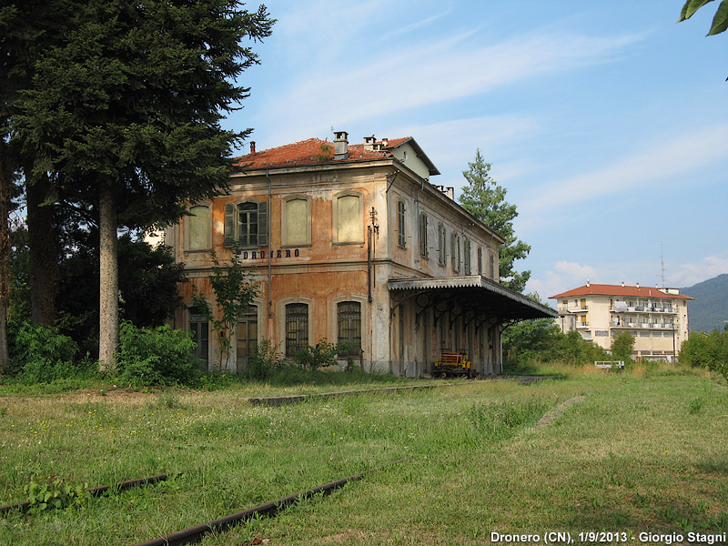 Dronero. Era la stazione terminale di una breve linea diramata, lunga 12 km, che si staccava a Busca dalla Cuneo-Saluzzo. Sulla Busca-Dronero il servizio viaggiatori è cessato nel 1966, quello merci si è protratto sempre più sporadicamente fino al 1982. Il fabbricato giace in stato di abbandono ma sostanzialmente integro.